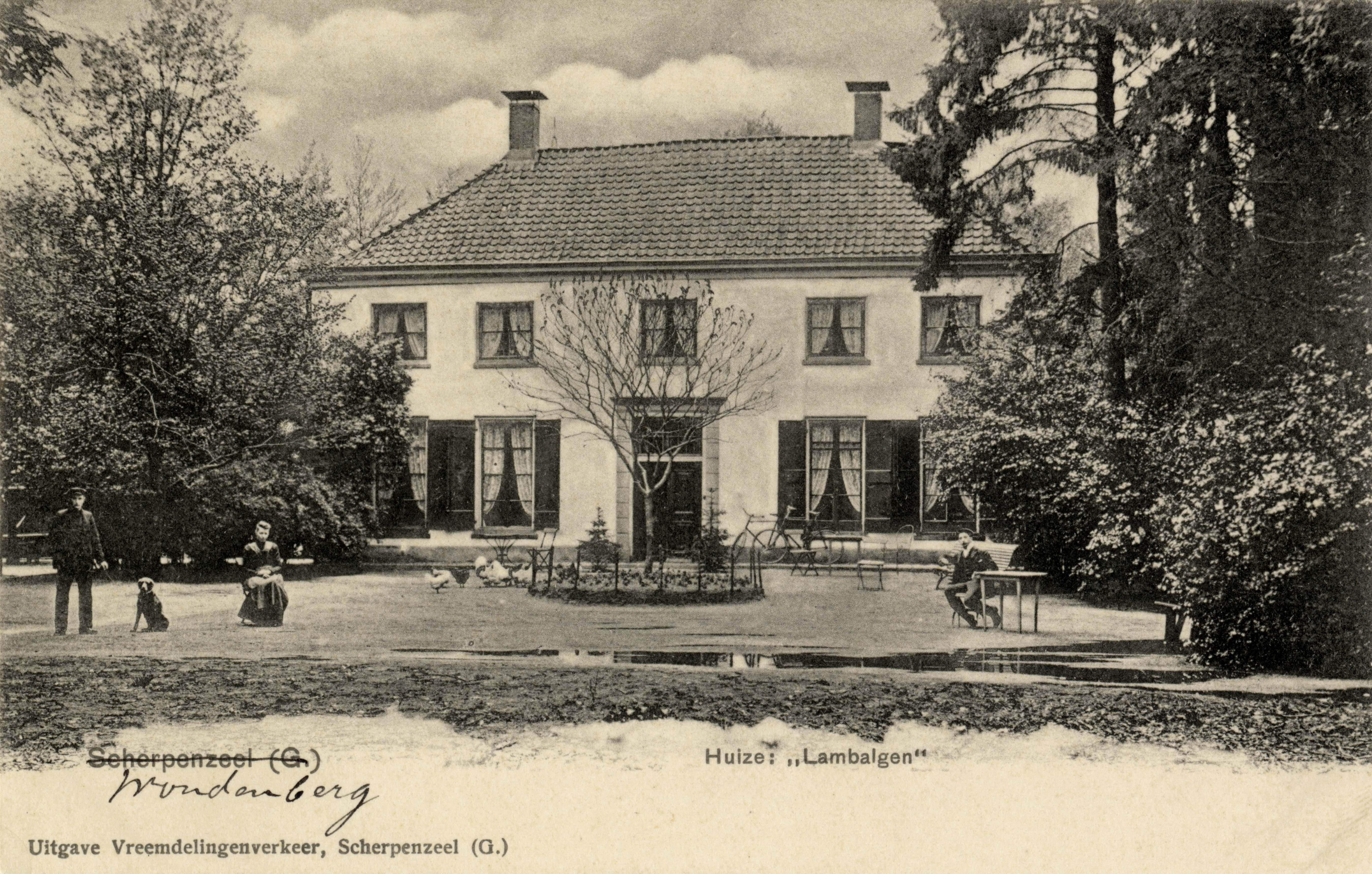 Reclamefoto van Huize Lambalgen bij Woudenberg